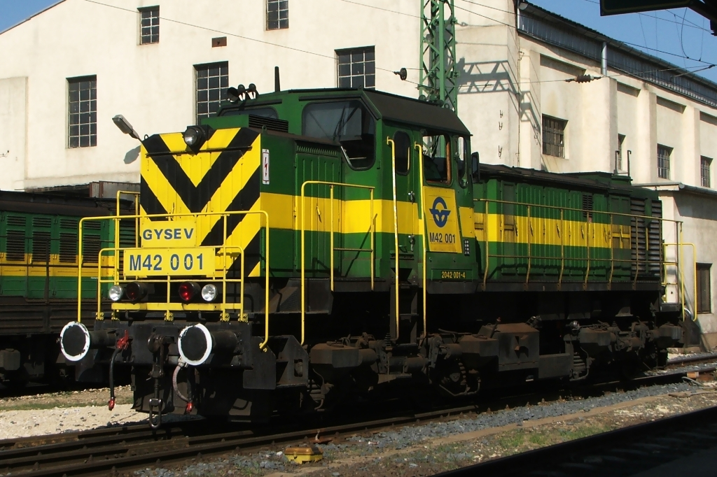 A GySEV M42 típusú dízel mozdonya a soproni pályaudvaron.